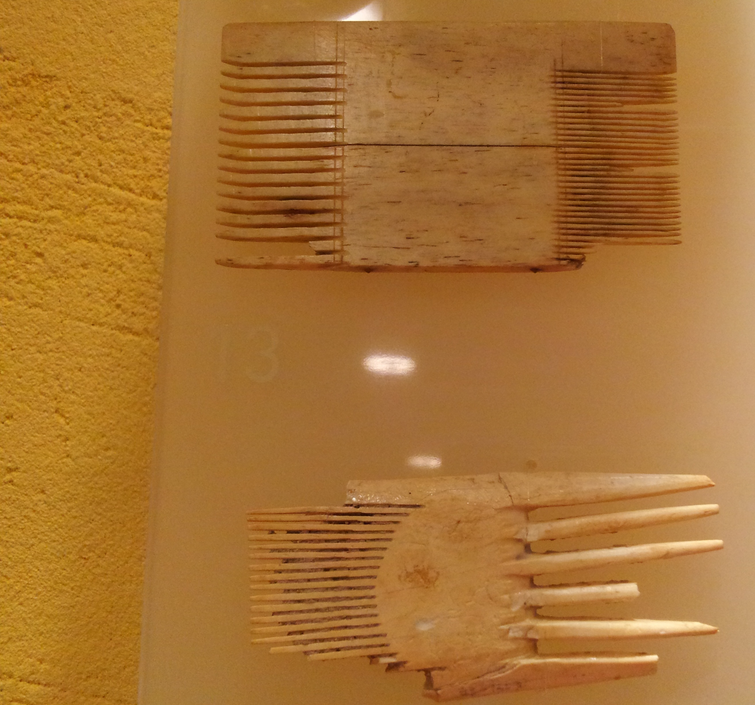 צמד מסרקים עשויים עצם מתל אשדוד, מתוך תערוכת "ורַפֹּא יְרַפֵּא" - רפואה ובריאות בעת העתיקה ובימי ראשית התחדשות היישוב בארץ ישראל, במרכז הרפואי רמב"ם בחיפה, Ancient bone combs, from Tel Ashdod, Israel